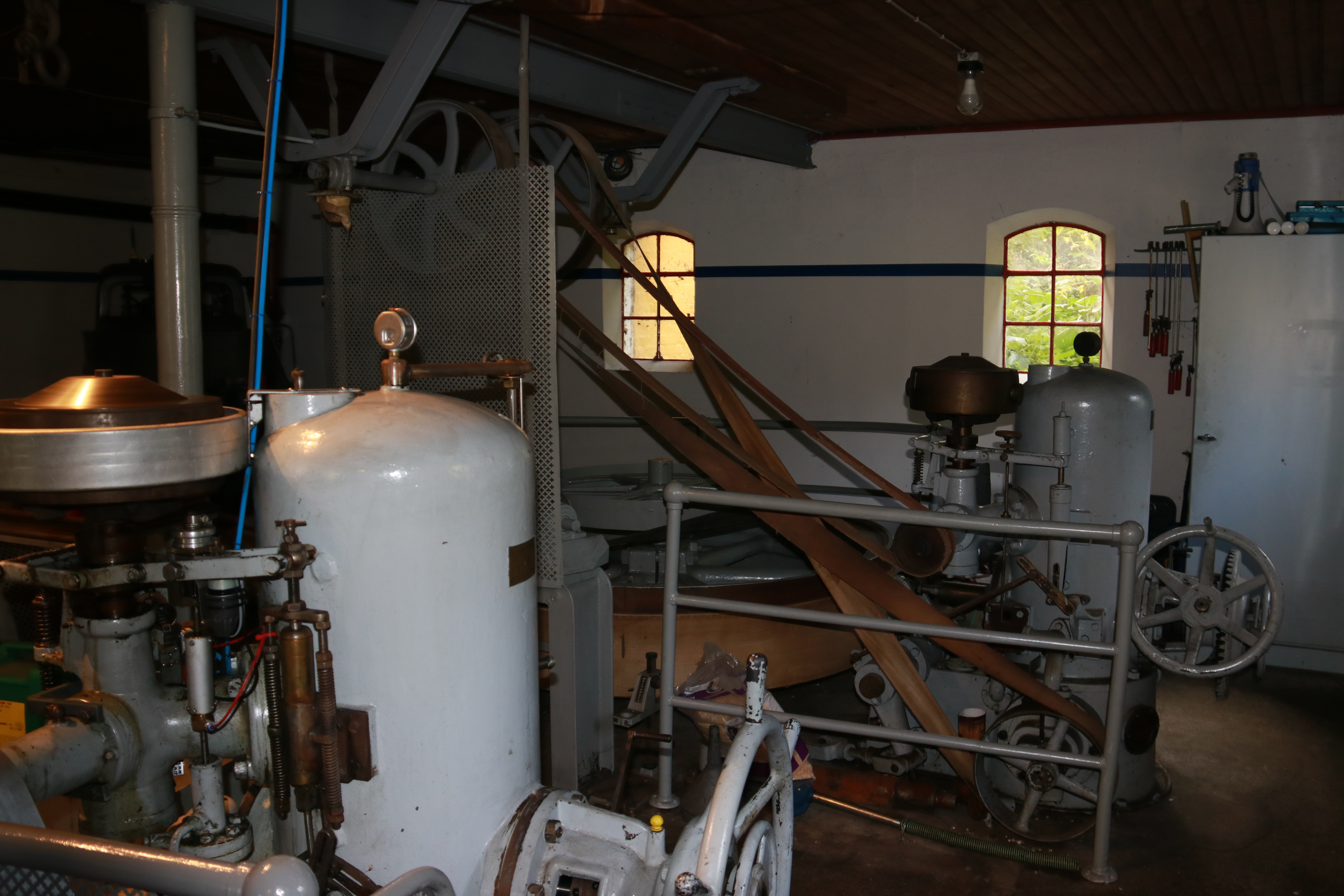 Maschinenhaus Bindslev Gamle Elværk